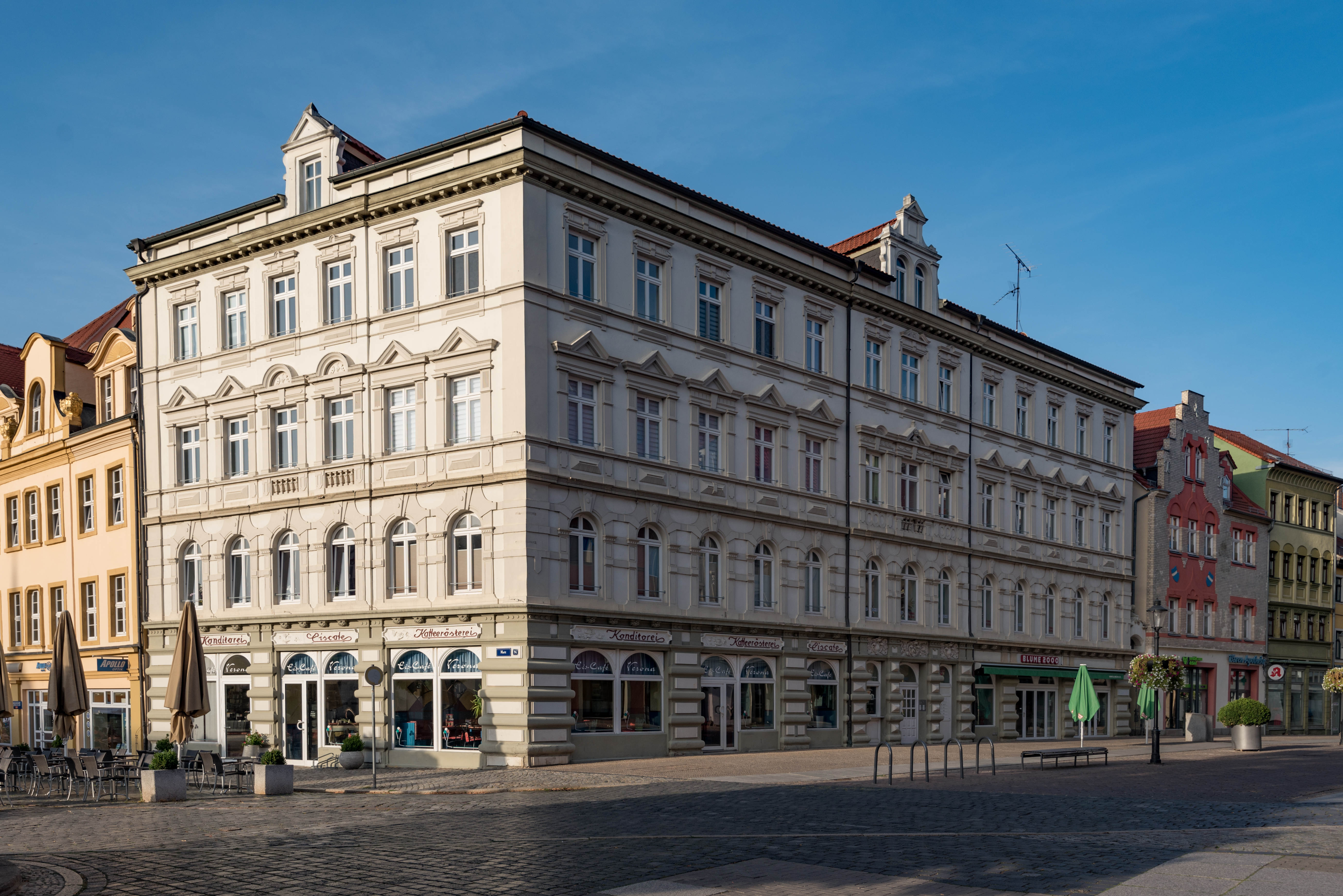 Naumburg (Saale), Markt 8